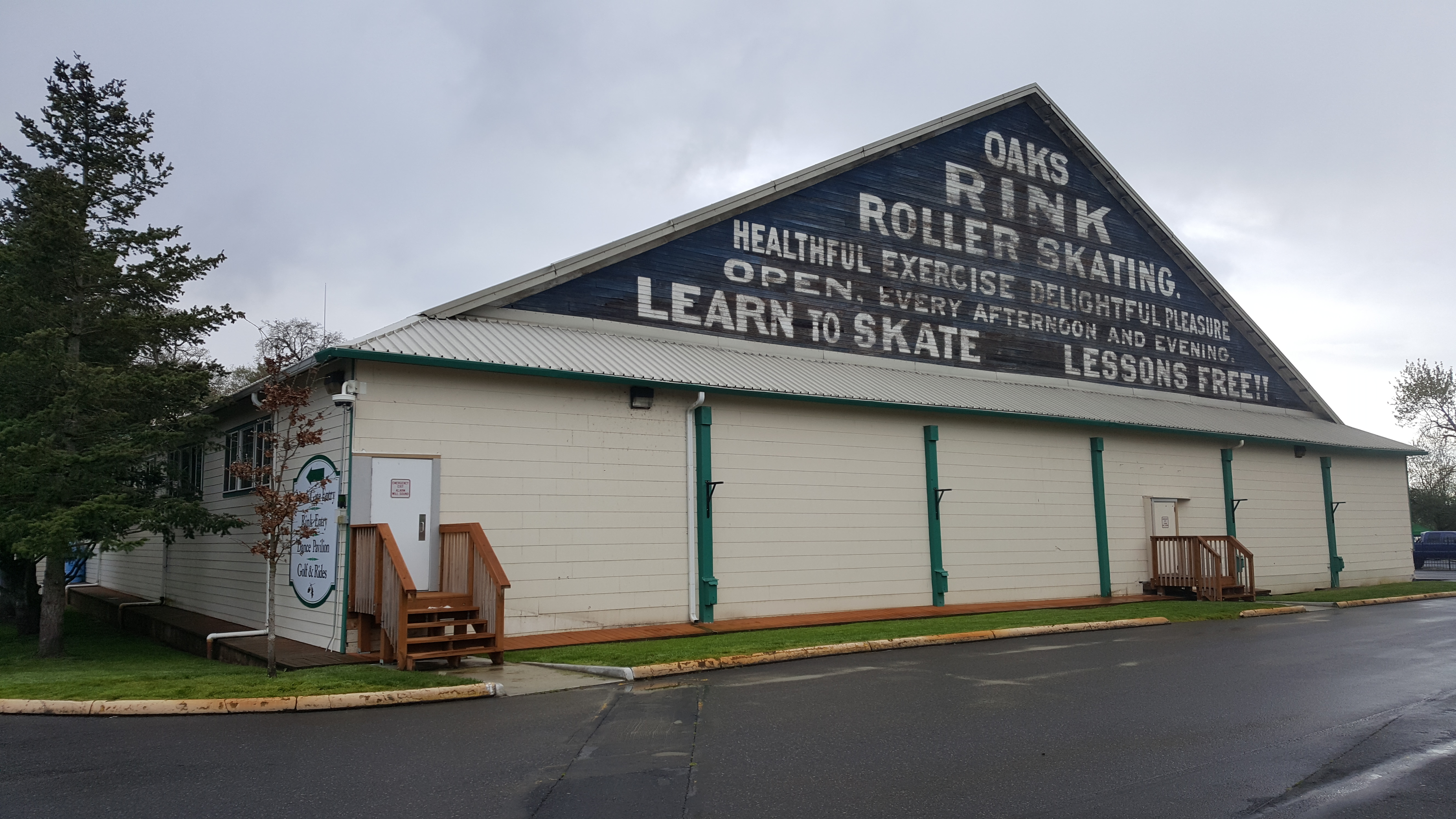 Roller rink